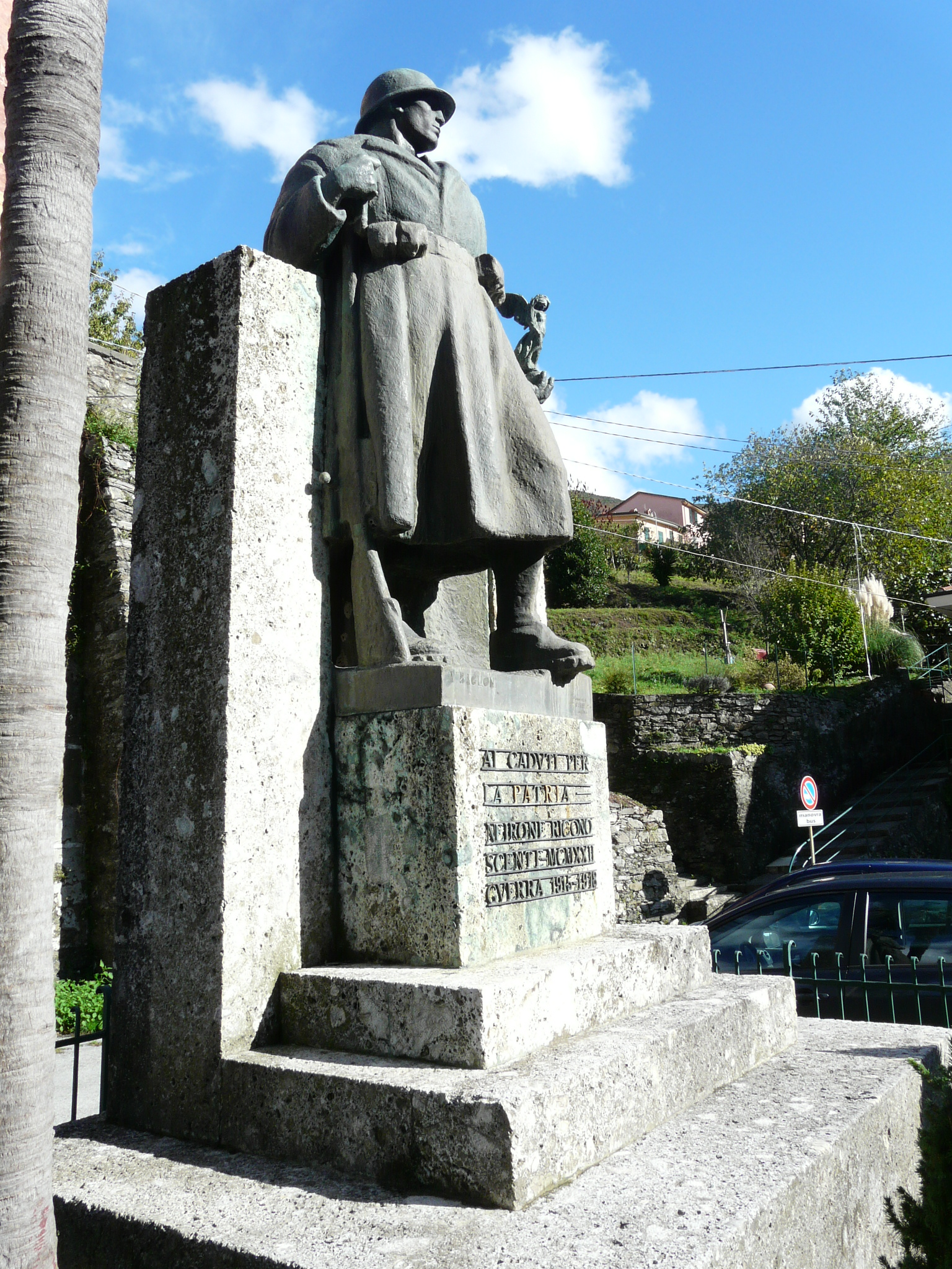 Monumento ai caduti di Neirone, Liguria, Italia